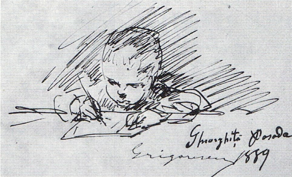 Gheorghiță scriind - Fiul lui Nicolae Grigorescu. Schiță